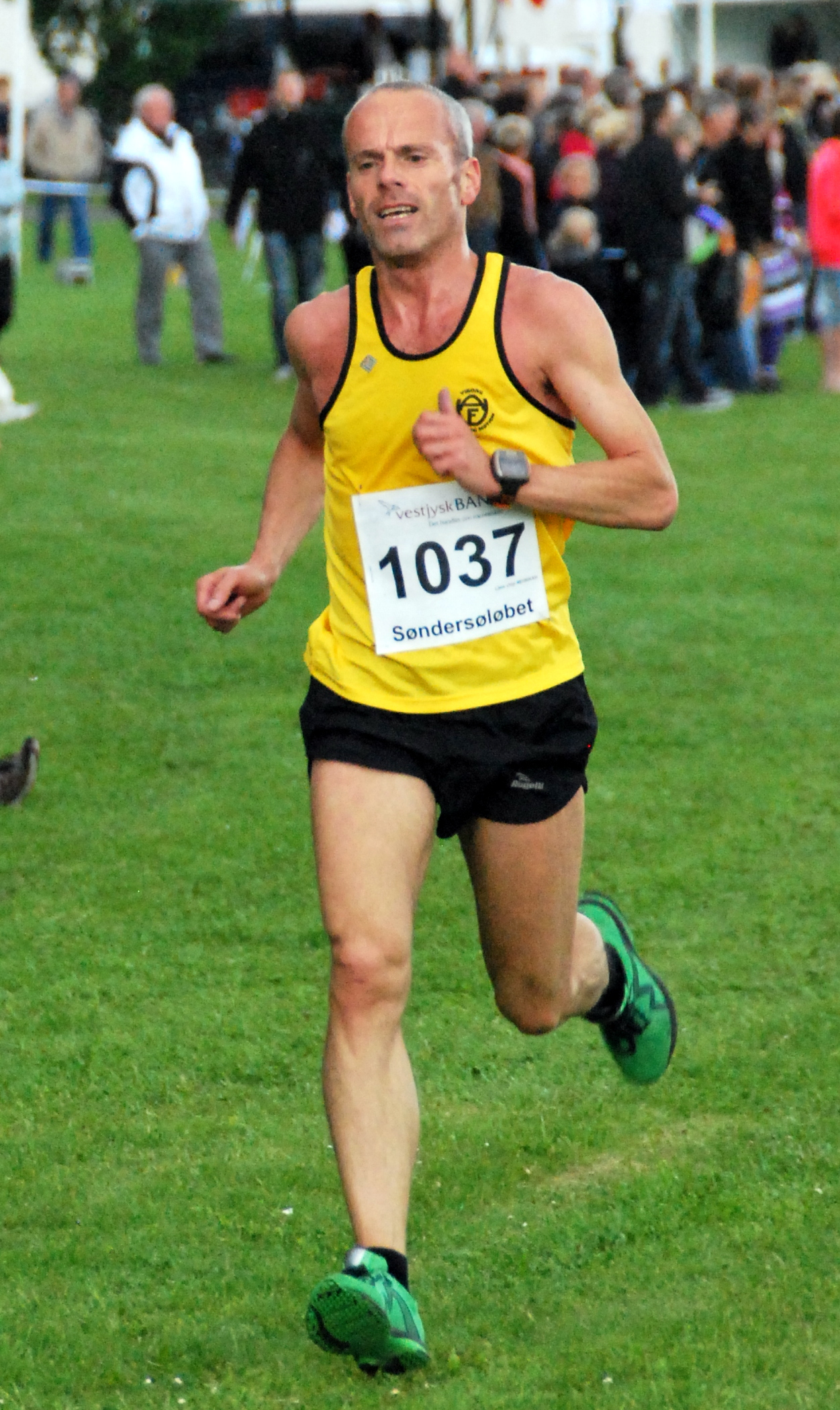 Søren Rasmussen, dansk atlet. Dansk mester I marathon 1997. Syv gange vinder af Søndersøløbet i Viborg. Første gang i 1989 og sidste gang i 2001.